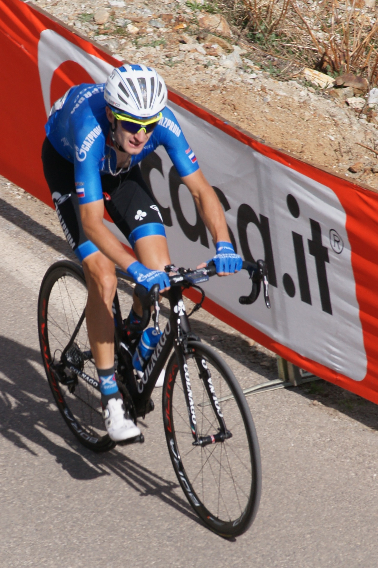 Sergey Firsanov, étape 20 col de la Lombarde Giro 2016